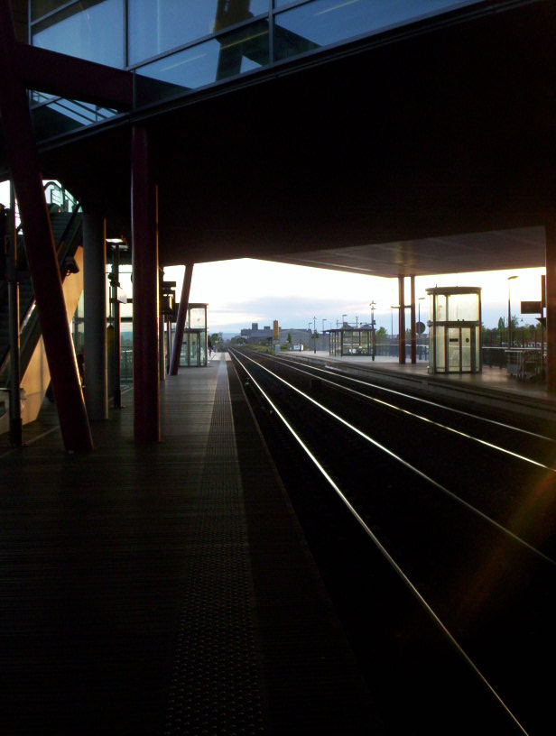 Vue des quais TER de la gare de Valence-TGV (Direction Valence Ville / Lyon / Montélimar)